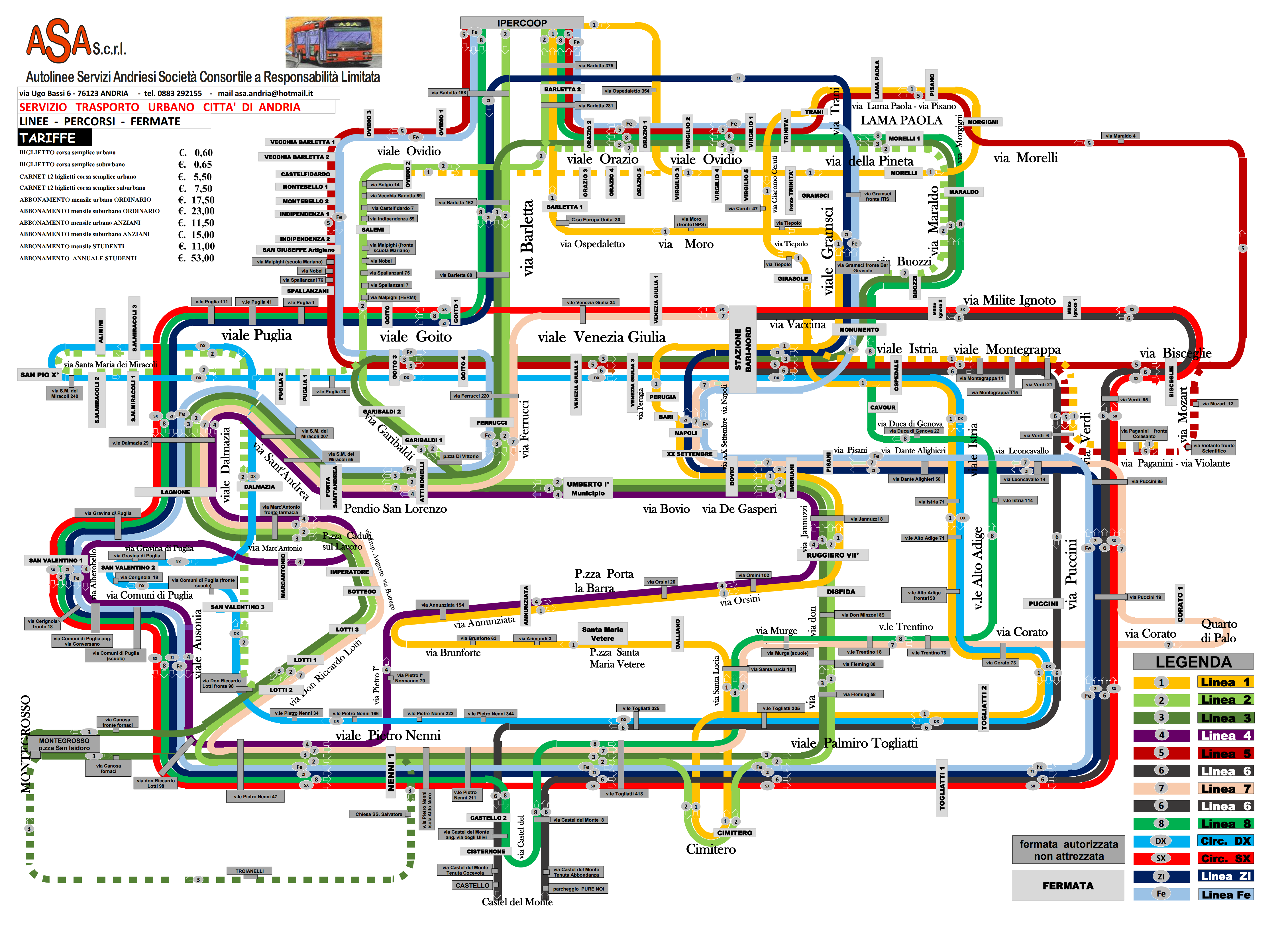 Mappa del Servizio Autolinee Urbane Autobus ASA di Andria